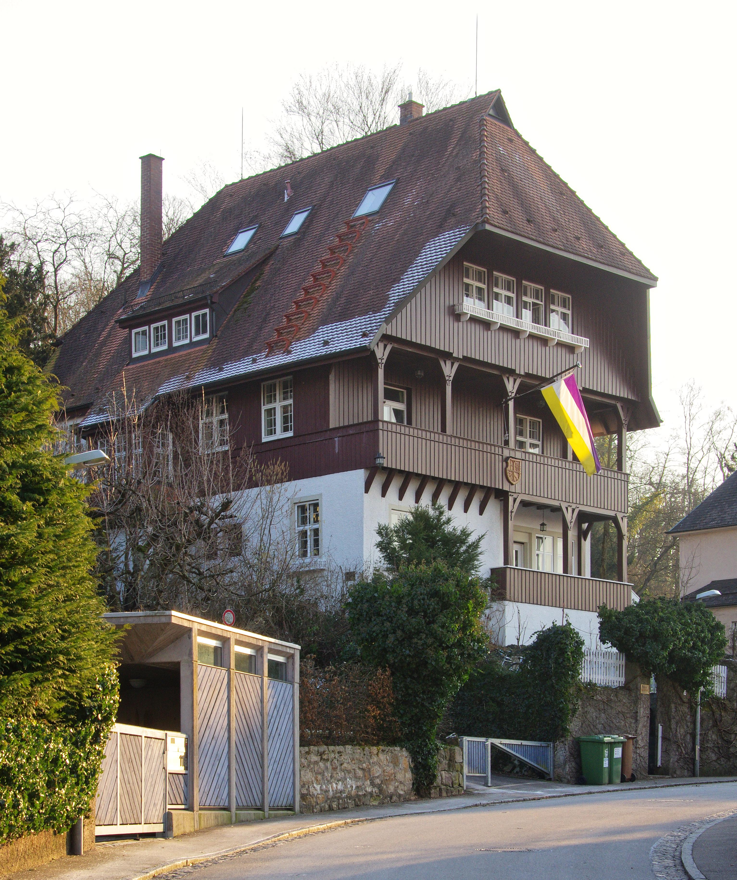 K.D.St.V. Ripuaria Freiburg Schlierbergstraße 15 79100 Freiburg